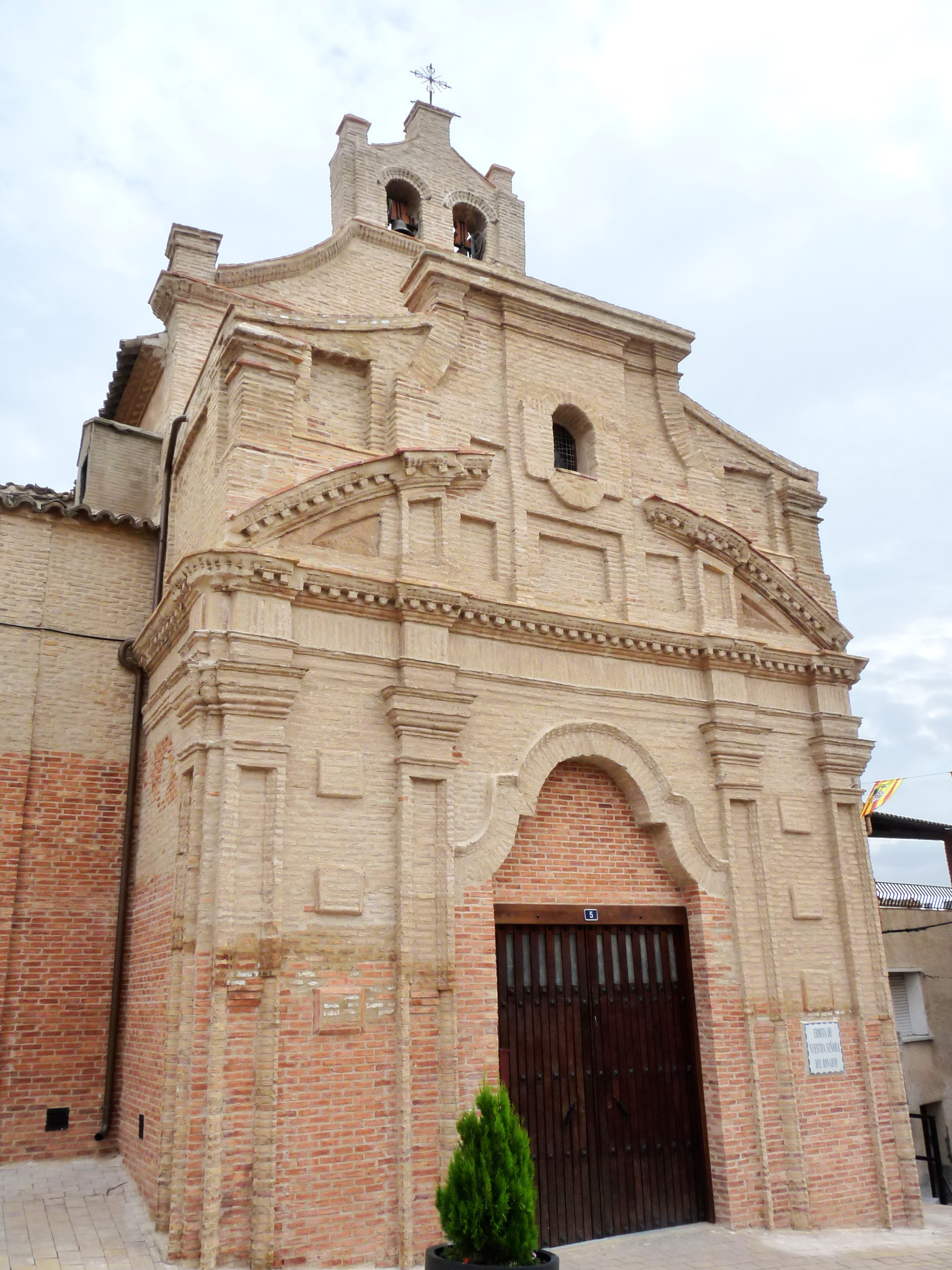 Magallón - Ermita de Nuestra Señora del Rosario (s. XVII-XVIII)